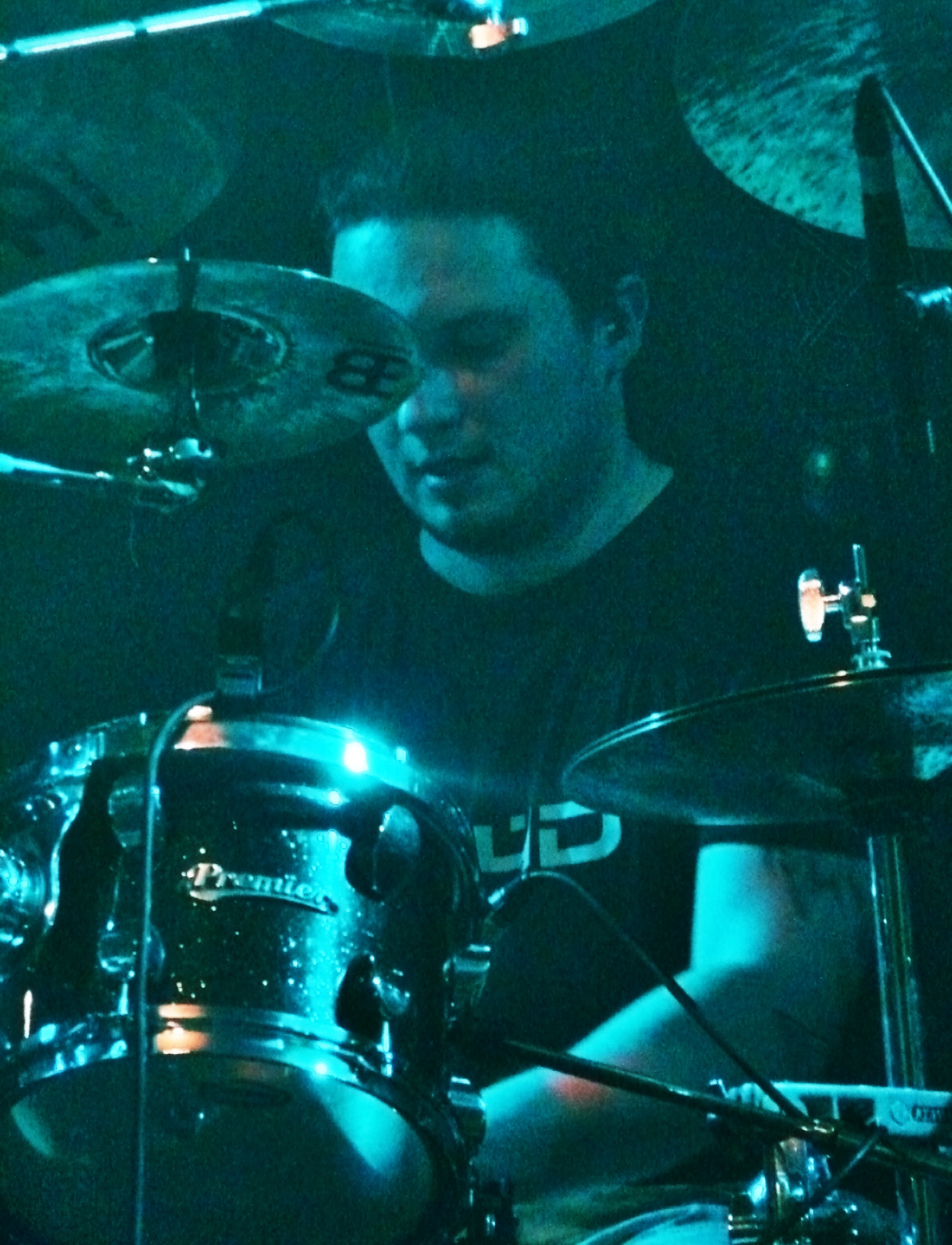 Vader en concert à la Locomotive, à Paris, le 01/05/08.